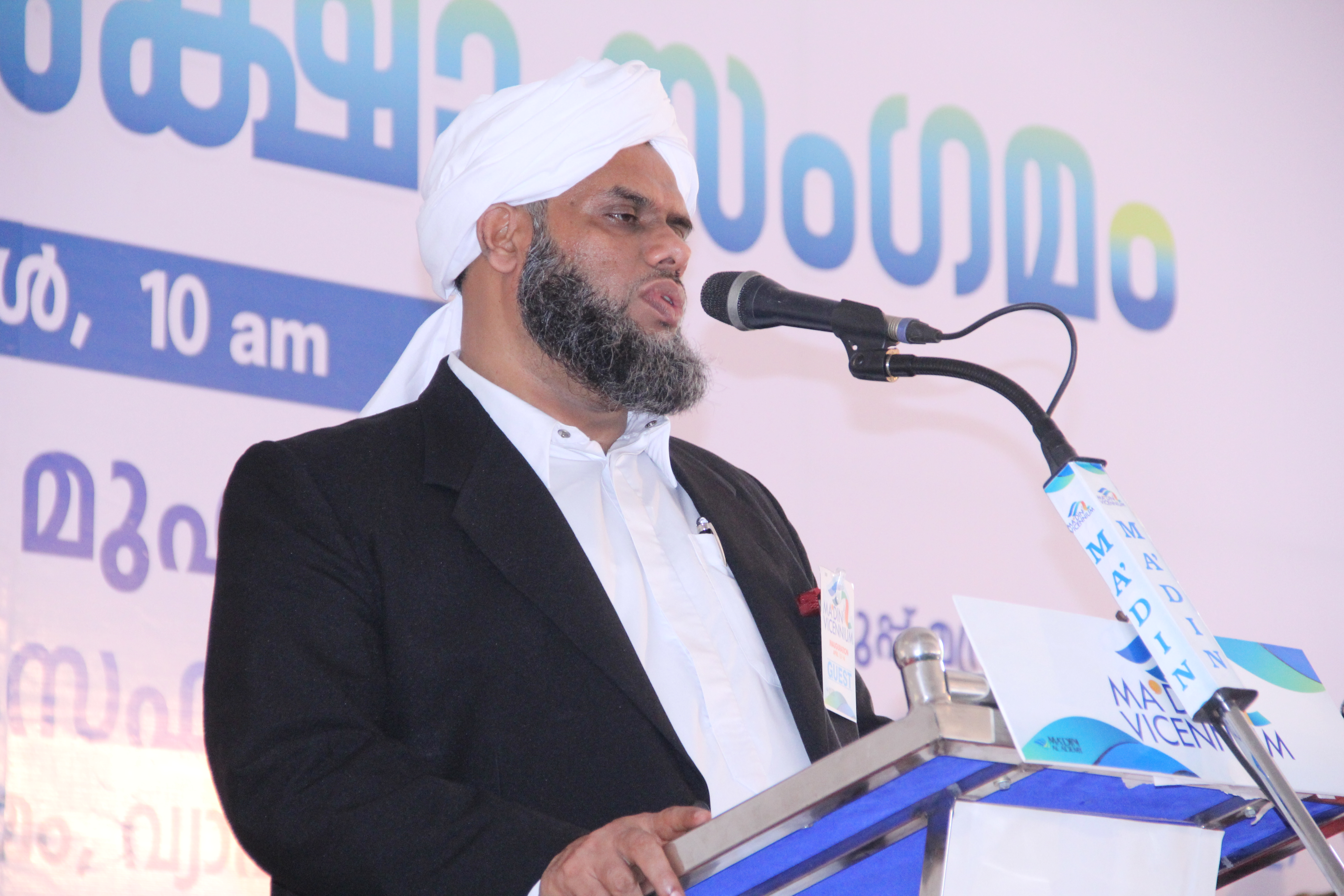 സയ്യിദ് ഇബ്റാഹീമുല്‍ ഖലീല്‍ അല്‍ ബുഖാരി